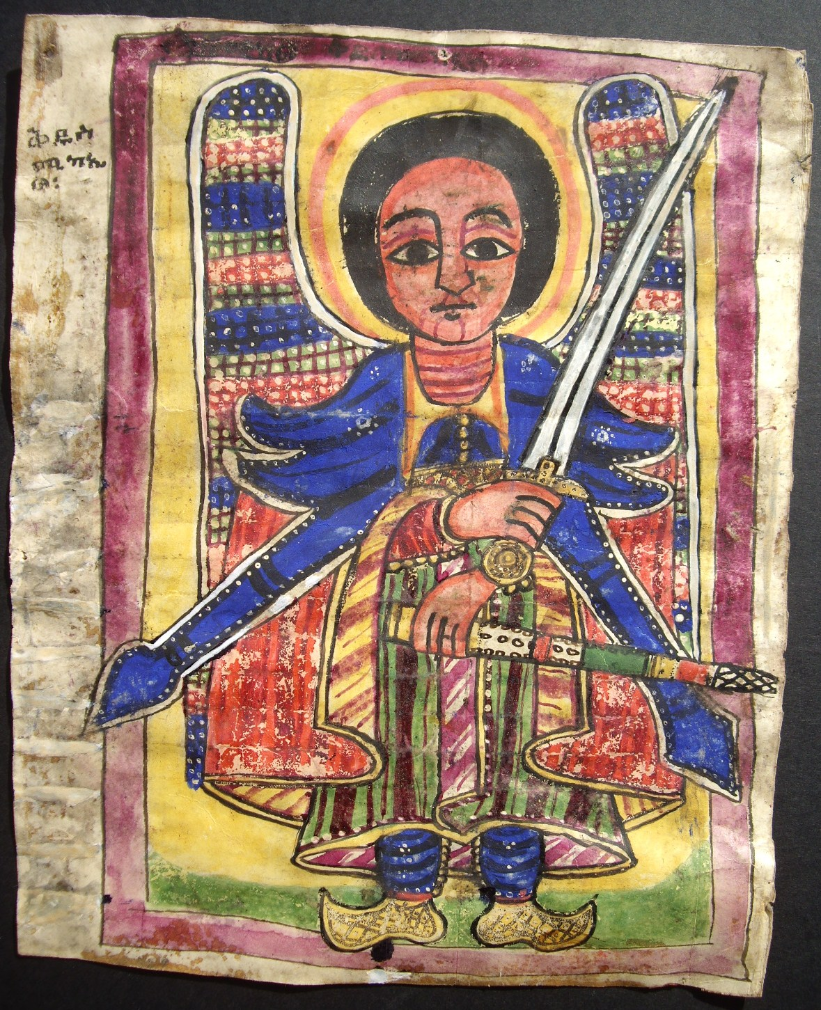 Ethiopian icon XX